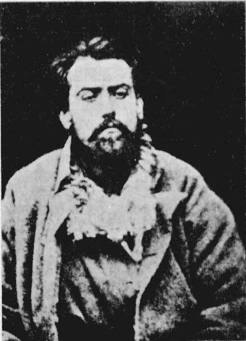 Grigorij Anfimovič Popko